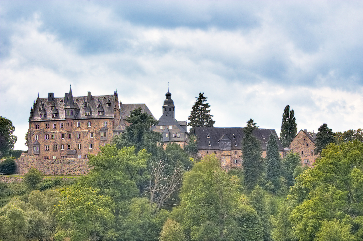 Schloss Eisenbach ist eine 1217 erstmals urkundlich erwähnte Burg-/Schlossanlage, die drei Kilometer südlich von Lauterbach im Vogelsberg liegt.